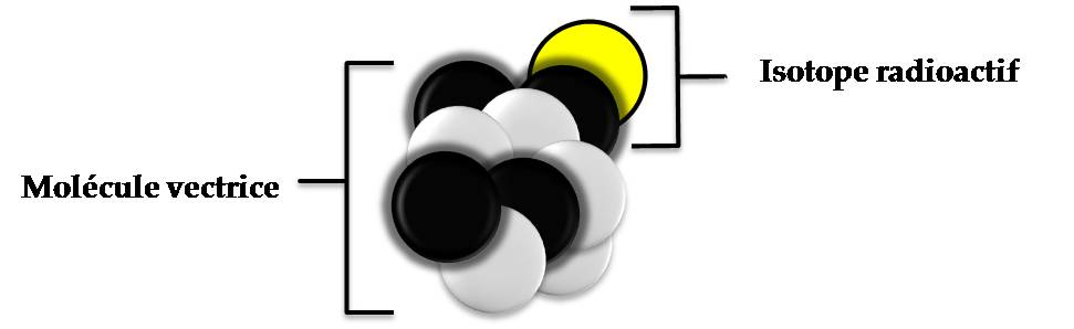 radiotraceur : explication